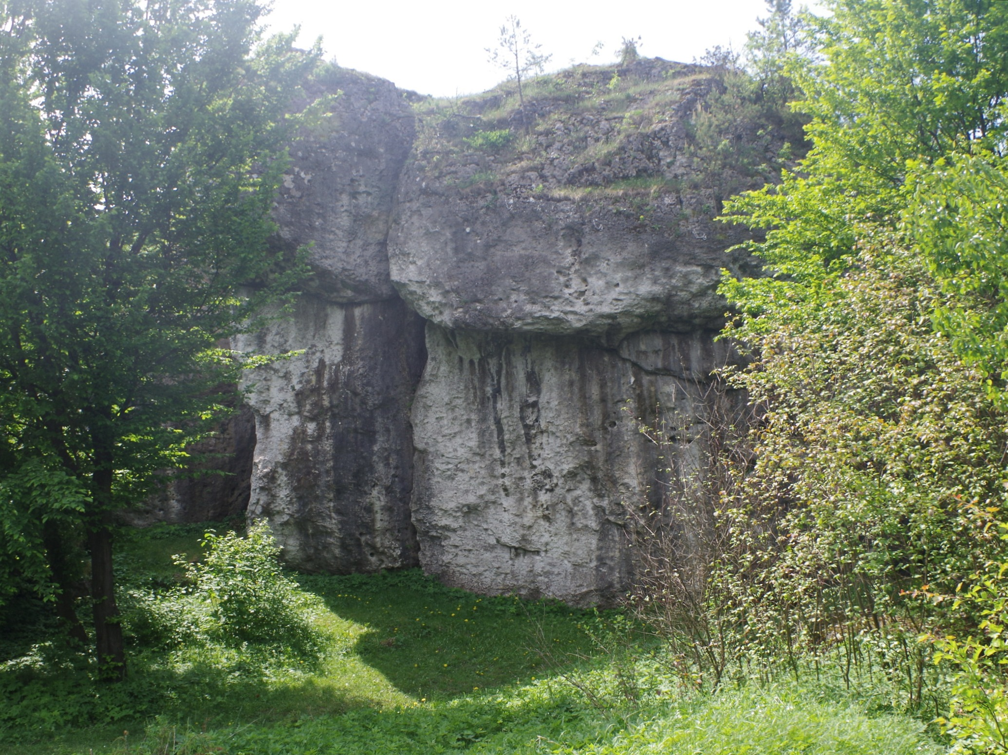 Skała Felin w grupie Straszykowych Skał w Ryczowie